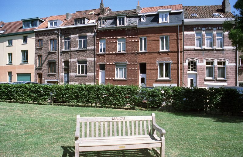 Egy pad a Parc Malou határán, Brüsszel